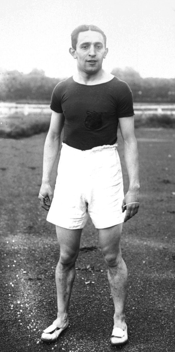 [20-7-13, Colombes, France-Belgique] Jacquemin [portrait du vainqueur belge des 200 et 400 mètres] : [photographie de presse] / [Agence Rol]